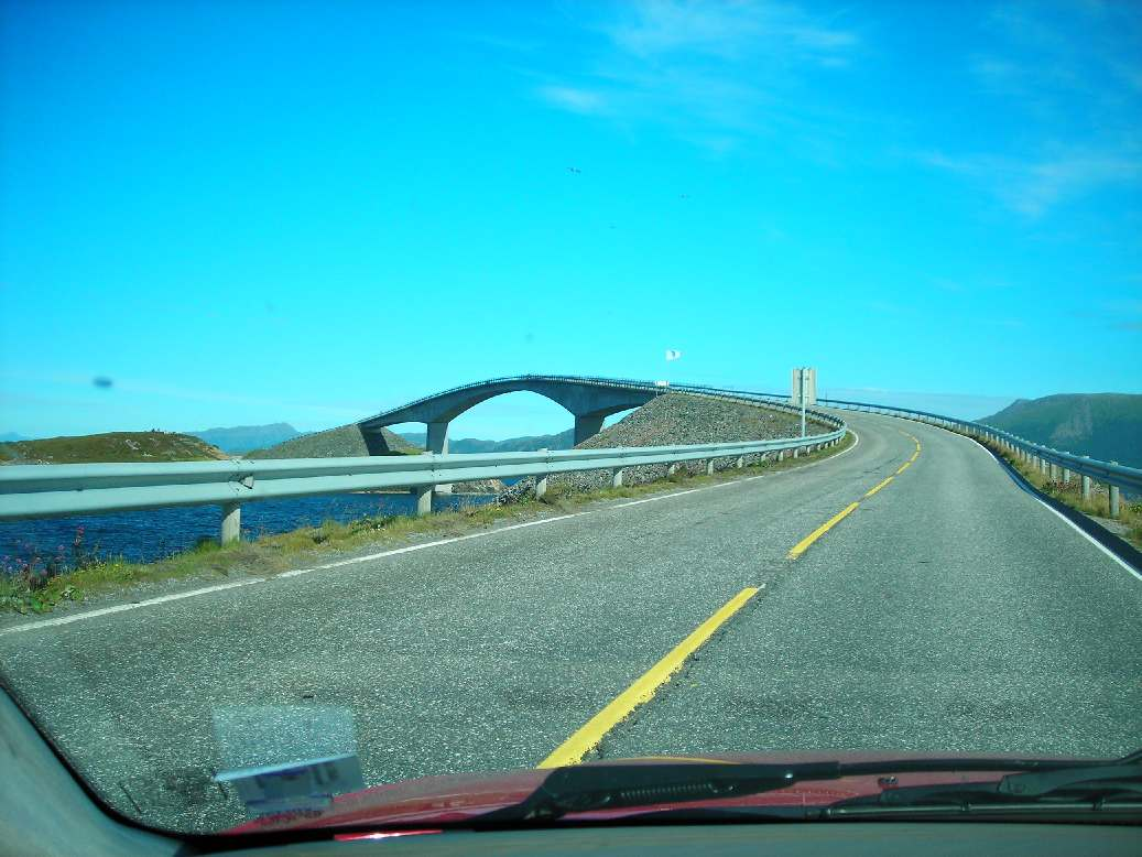 Road 64, Atlanterhavsveien and Storseisundet bridge in Norway